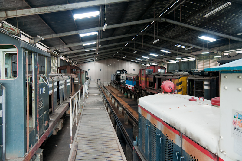 Innenansicht des Depot in Tanjung Aru (Sabah State Railway)